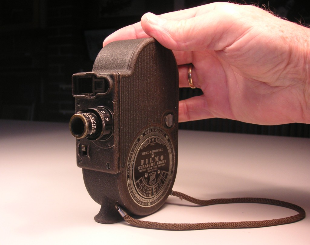 Bell & Howell 8mm kamera "Filmo Straigt Eight"